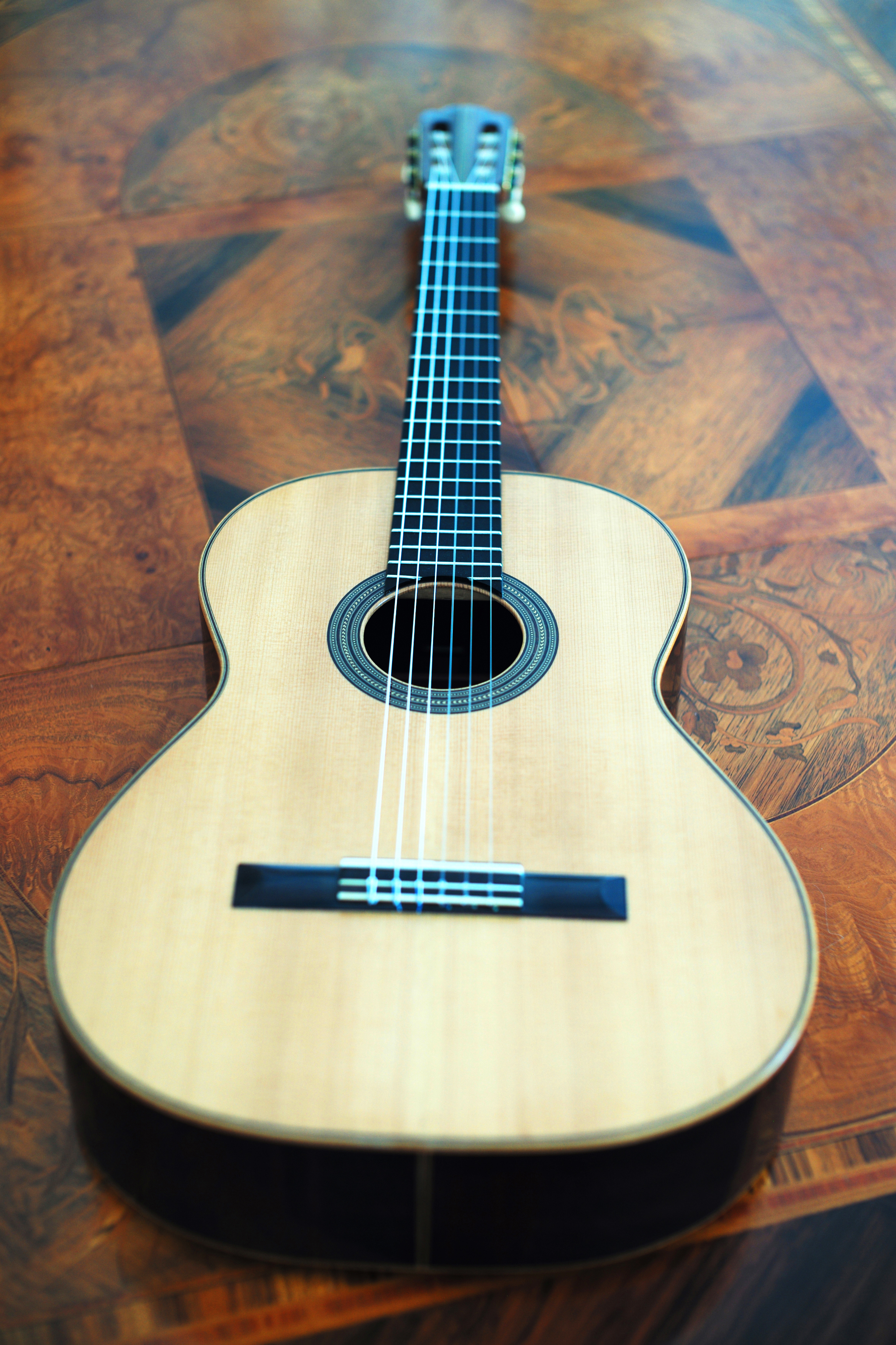 Hermann Hauser I, 1936 Foto: Stiftungsarchiv Hermann Hauser Guitar Foundation, 2017